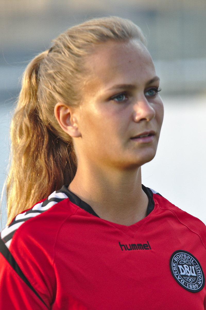 Freundschaftsspiel ÖFB Damen Nationalmannschaft gegen Dänemark am 6. Juli 2017. Bild zeigt: Frederikke Skjødt Thøgersen